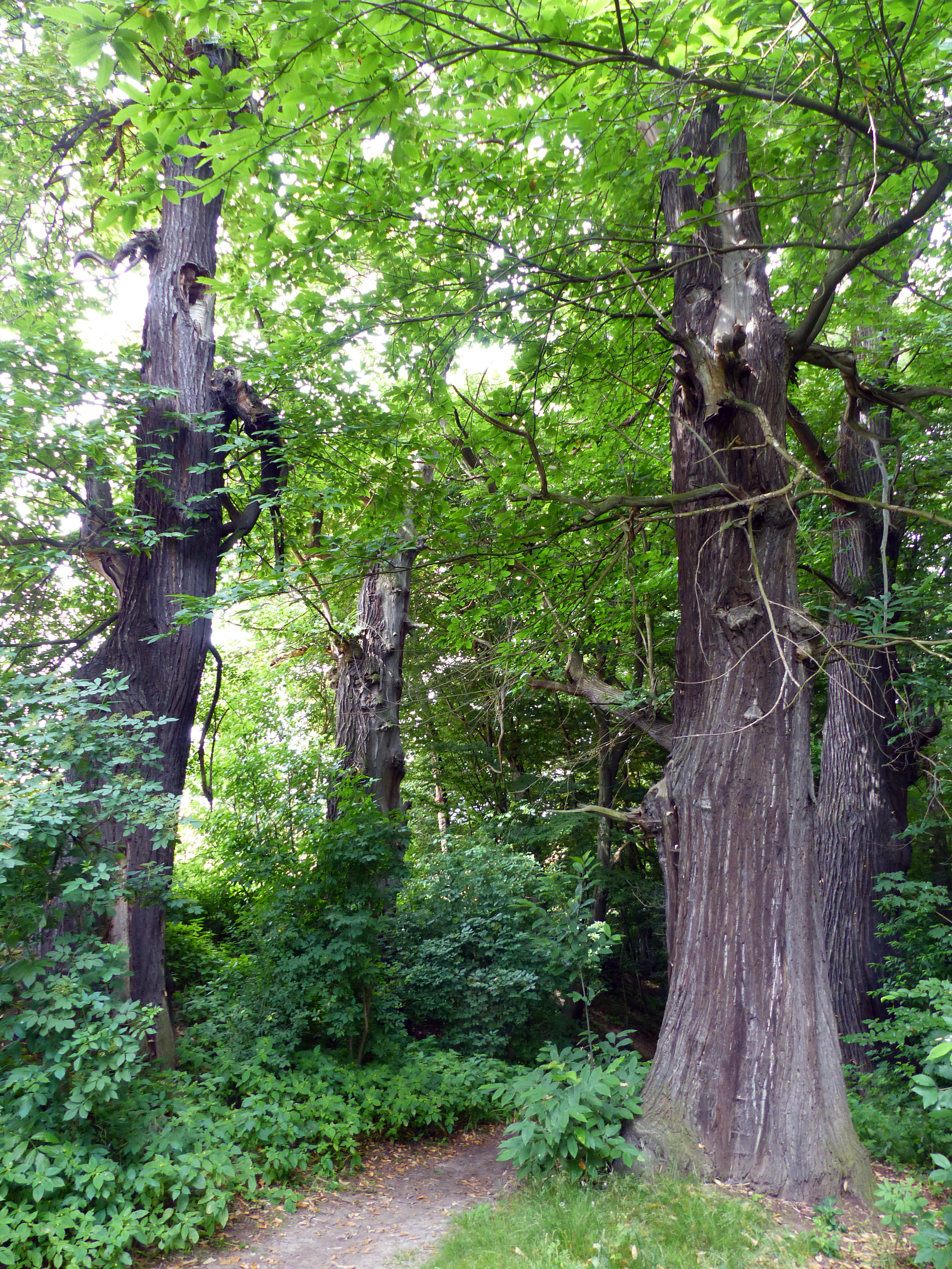 Naturdenkmal "Fünf Brüder" - Baumgruppe Esskastanien, Tännichtgrund, Oberwartha, Dresden